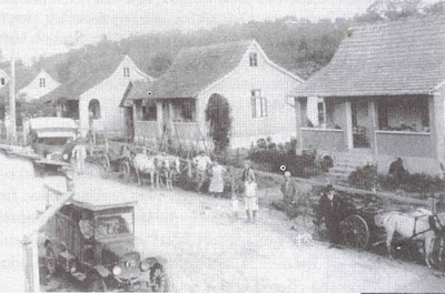 Rua João Pessoa em Blumenau - Bairro da Velha.